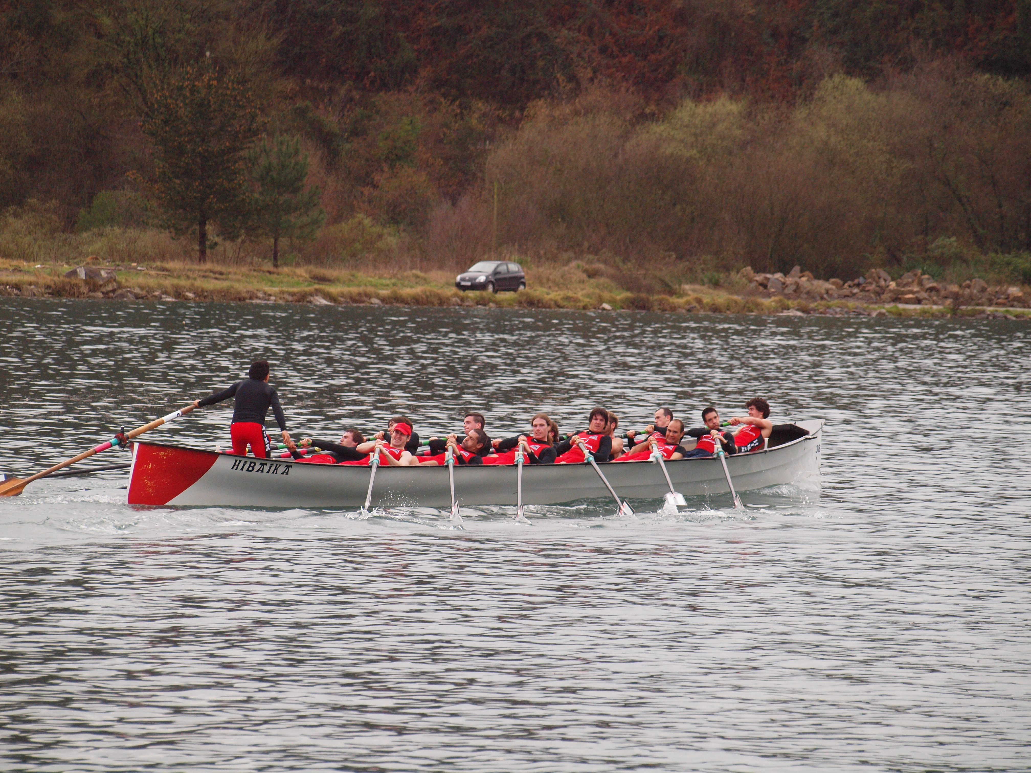 Hibaika Orioko traineru jeitsieran.